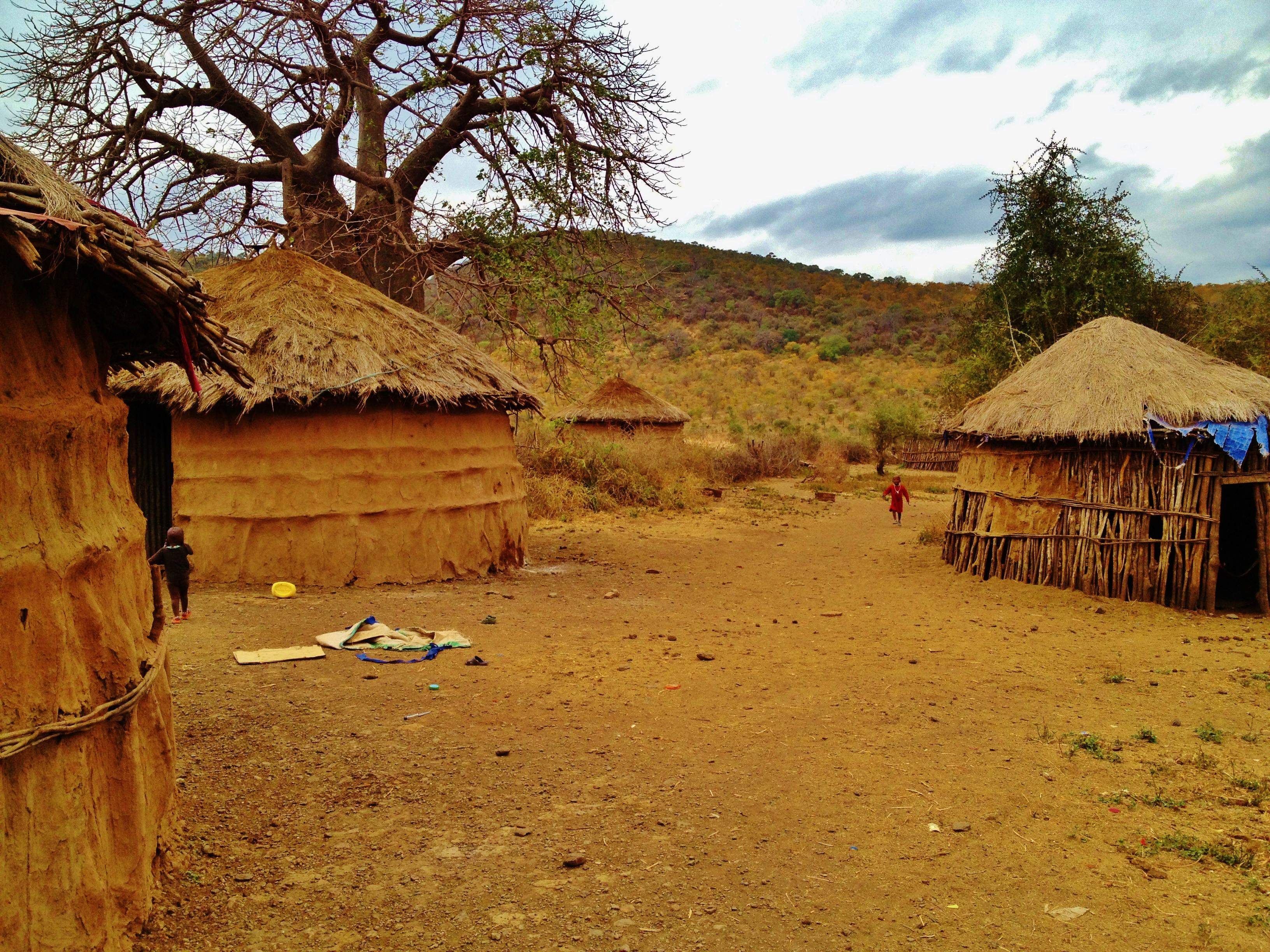 Maasai Land Tanzania